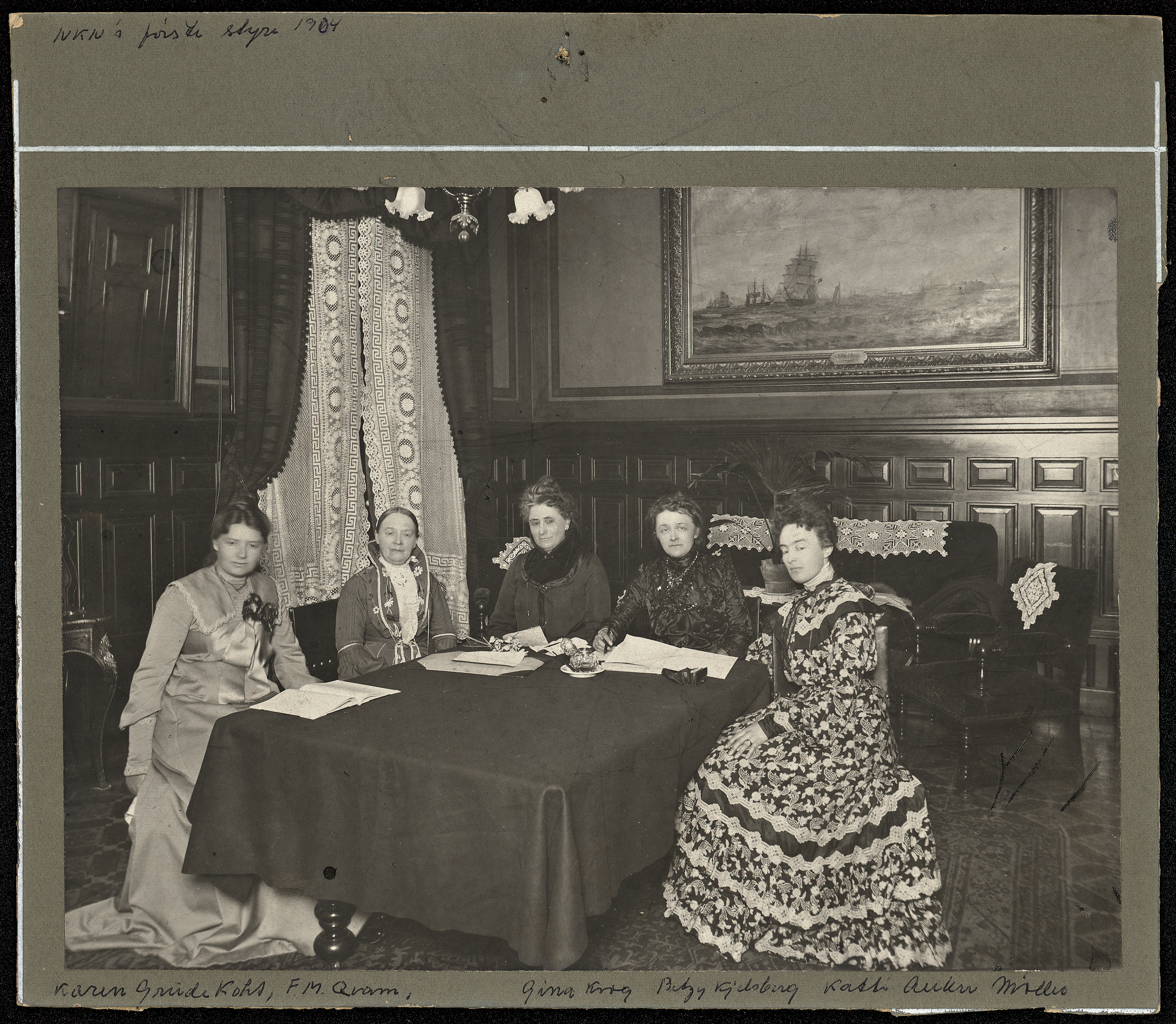 NKNs første styre 1904. NKN er en forkortelse for Norske Kvinners Nasjonalråd (etablert 1904). Fra venstre: Karen Grude Koht, Fredrikke Marie Qvam, Gina Krog, Betzy Kjelsberg og Katti Anker Møller. Dato / Date: 1904 Fotograf / Photographer: ukjent / unknown Eier / Owner Institution: Nasjonalbiblioteket / National Library of Norway Lenke / Link: Bildesignatur / Image Number: blds_01874